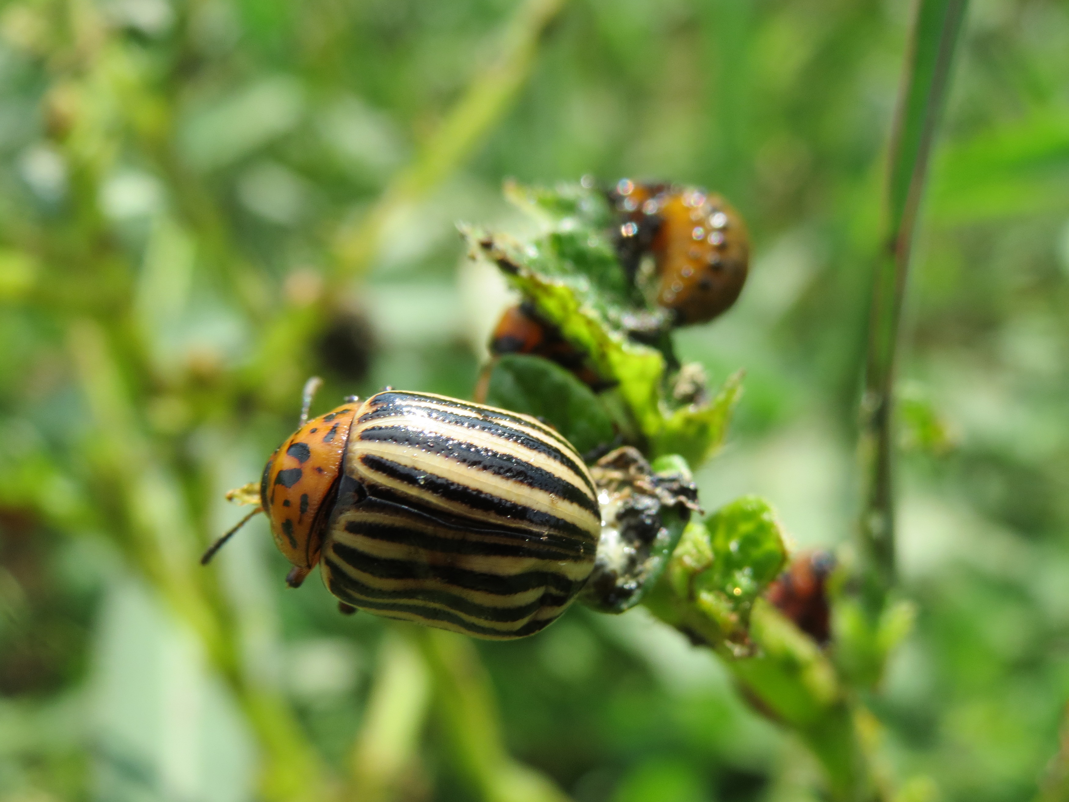 Kartoffelkäfer (Leptinotarsa decemlineata) auf einem Feld bei Wiesbaden